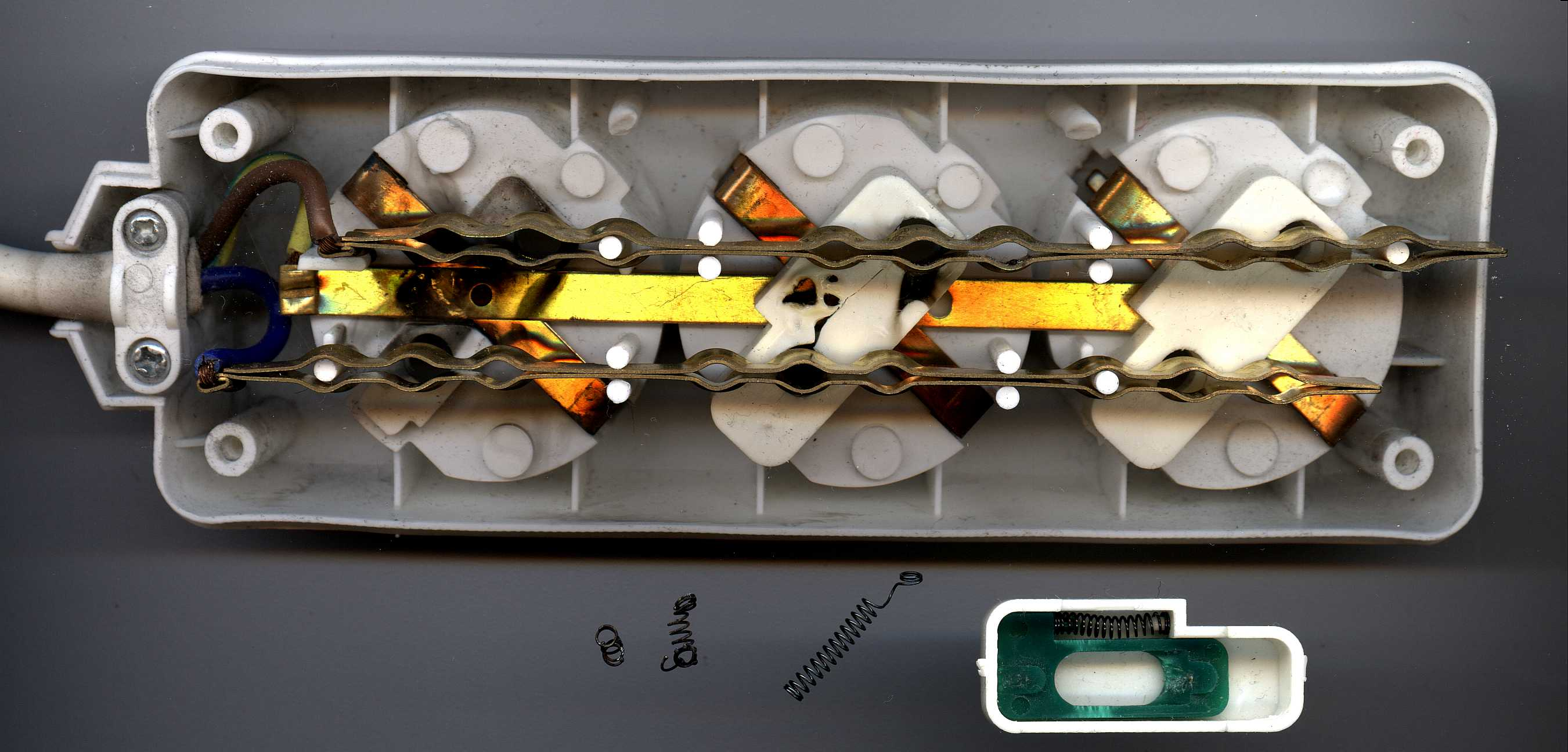 Dreifachverteiler mit primitiven Kindersicherungen und Spuren eines dadurch verursachten Kurzschlusses Die Bleche für den Schutzleiteranschluss der linken Steckdose sind durch einen Kurzschluss geschwärzt. Die Abdeckung der Kindersicherung von der linken Steckdose wurde an die Position der mittleren Steckdose gesteckt und weist ebenfalls Spuren des Kurzschlusses auf. Eine noch intakte Kindersicherung liegt unter dem Verteiler. Erkennbar sind die Schrägen, die das grüne Teil unter dem Druck der Steckerstifte gegen die Kraft der Feder verschieben und dadurch das Einstecken ermöglichen. Ebenfalls unter dem Verteiler liegen die Reste der beim Kurzschluss durchgebrannten Feder. Die Reste der zerstörten grünen Plasteteile wurden entsorgt. Bei der Zerstörung wird die Feder freigegeben und klappert in dem jeweiligen Gehäuse der Kindersicherung. So entsteht der Kurzschluss zwischen der Phase und dem Schutzleiter. So ein Kurzschluss ist unkritisch, weil er leicht bemerkt wird (FI-Schalter und/oder Sicherung). Zeitaufwändig kann ein Kurzschluss zwischen dem Neutralleiter und dem Schutzleiter sein. Dabei verteilt sich der Strom zu einem schwer auffindbaren Fehlerbild: Der zugeordnete FI-Schalter wird ausgelöst, wenn in einem Kreis, der einem anderen FI-Schalter zugeordnet ist, eine größere Last zugeschaltet ist (Beispiele: Anlaufen der Waschmaschine oder des Kühlschranks, Einstecken des zweipoligen Steckers eines Netzteils vom Laptop). Zur Eingrenzung des Fehlers ist es zweckmäßig, alle Neutralleiter des abschaltenden FI-Schalters im Schaltkasten zu trennen und einzeln anzuklemmen. Dabei kann der verursachende Bereich erkannt werden, was die Suche entscheidend erleichtert.